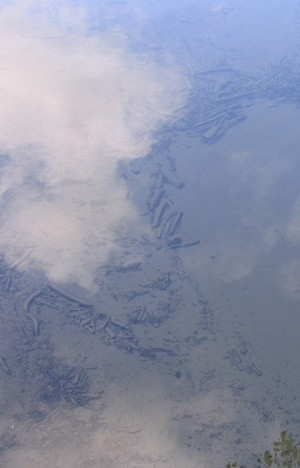 Autoriaus nuotrauka, 2005.06.23. „Ūlos akyje“ nuolat „verda“ smėlis. Nuotrauka gali būti platinama pagal GFDL licenciją.